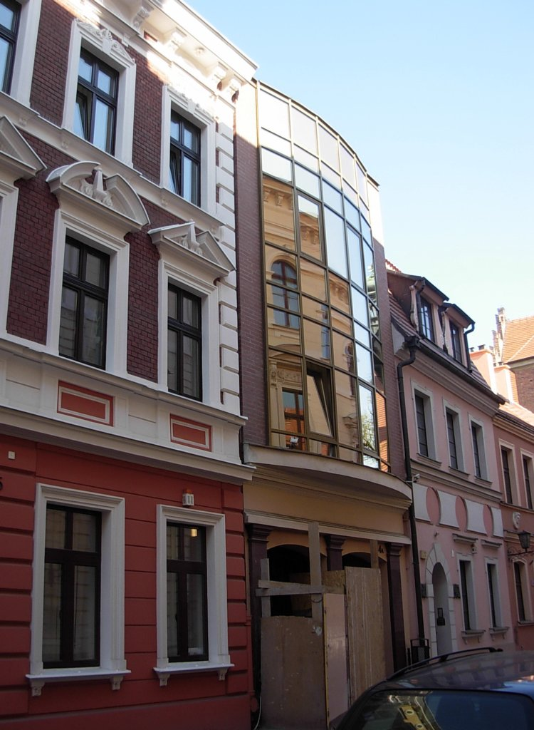 Kamienica Jezuicka 4a Bydgoszcz